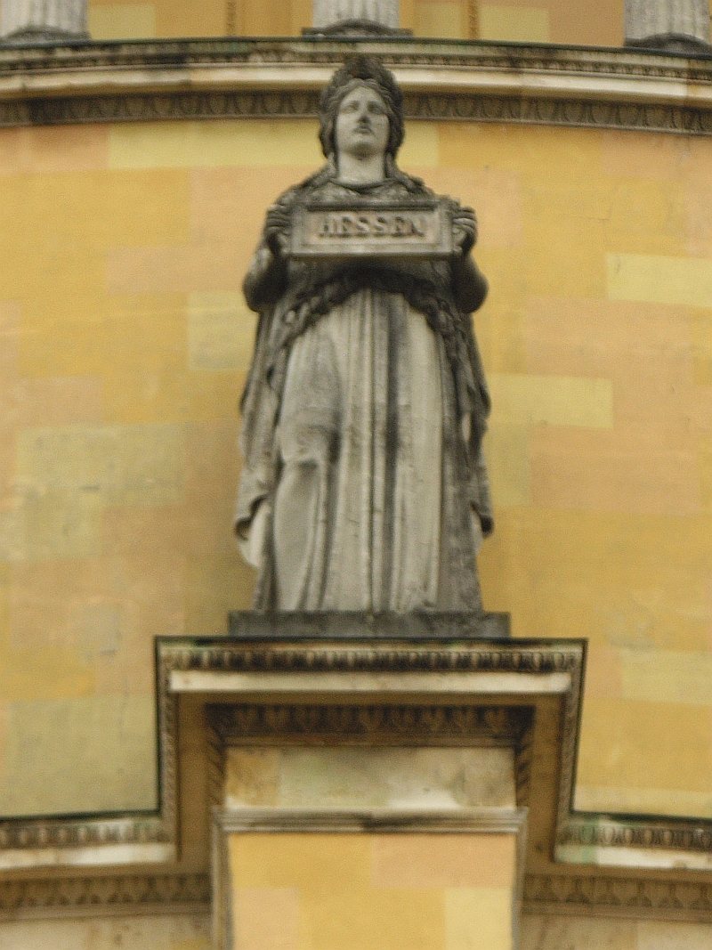 Diese Statue an der Aussenseite der Befreiungshalle in Kelheim steht für den Volksstamm der Hessen, Höhe der Statue 580 cm. Sie ist eine von 18 Statuen, die nach Modellen des Bildhauers Johann Halbig geschaffen wurden.